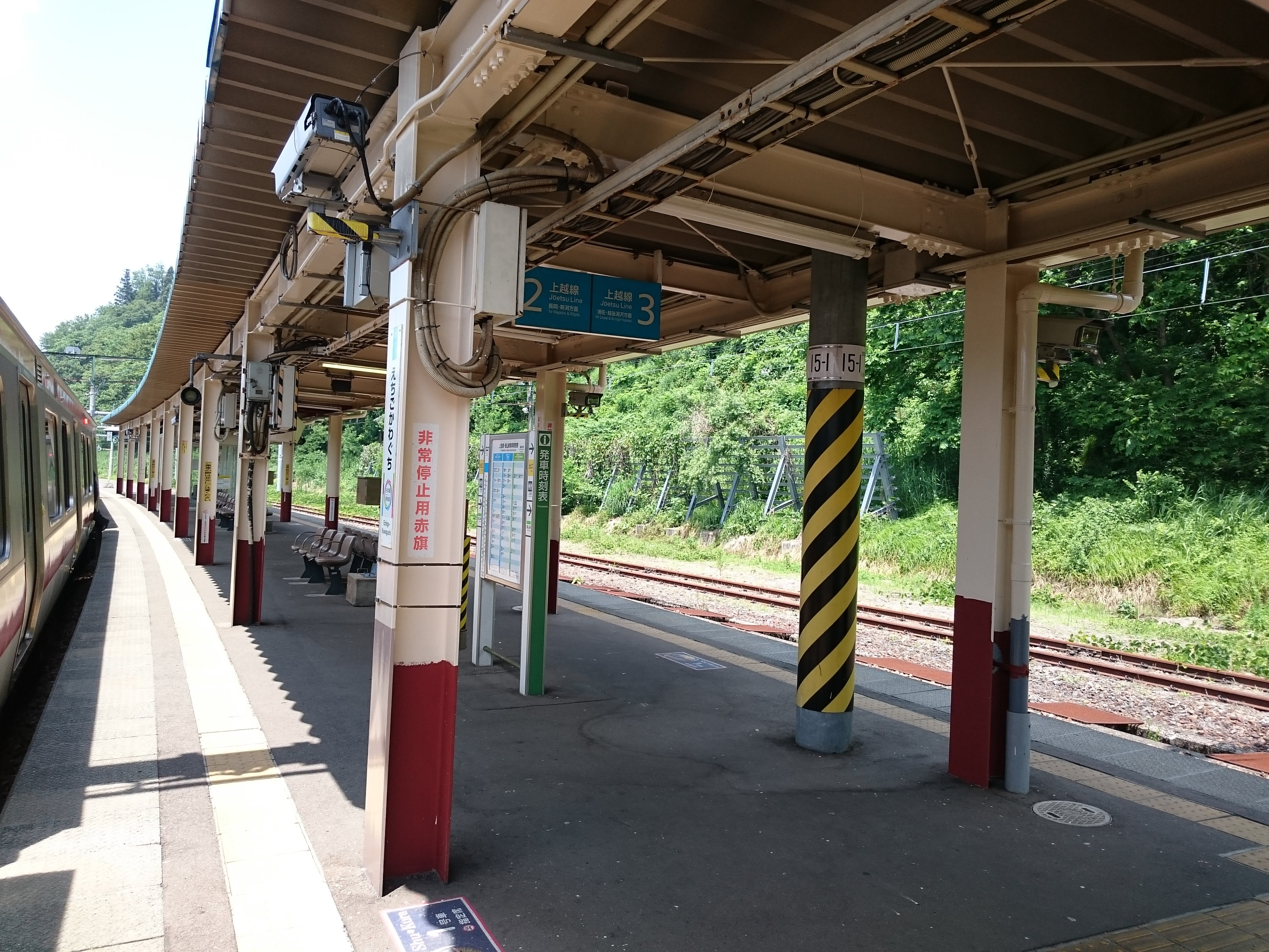 越後川口駅の上越線ホーム